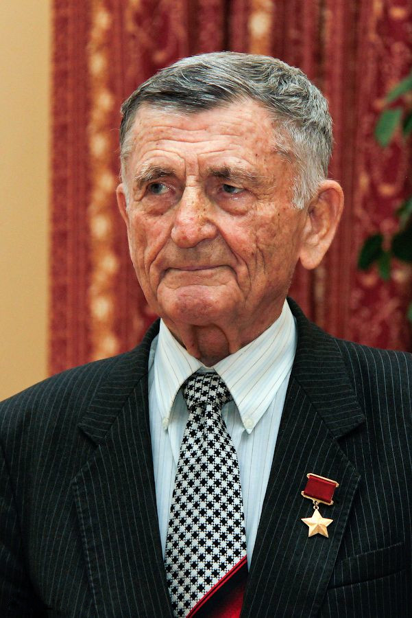 Герой Советского Союза Сергей Макарович Крамаренко (Hero of the Soviet Union Sergei Makarovich Kramarenko)